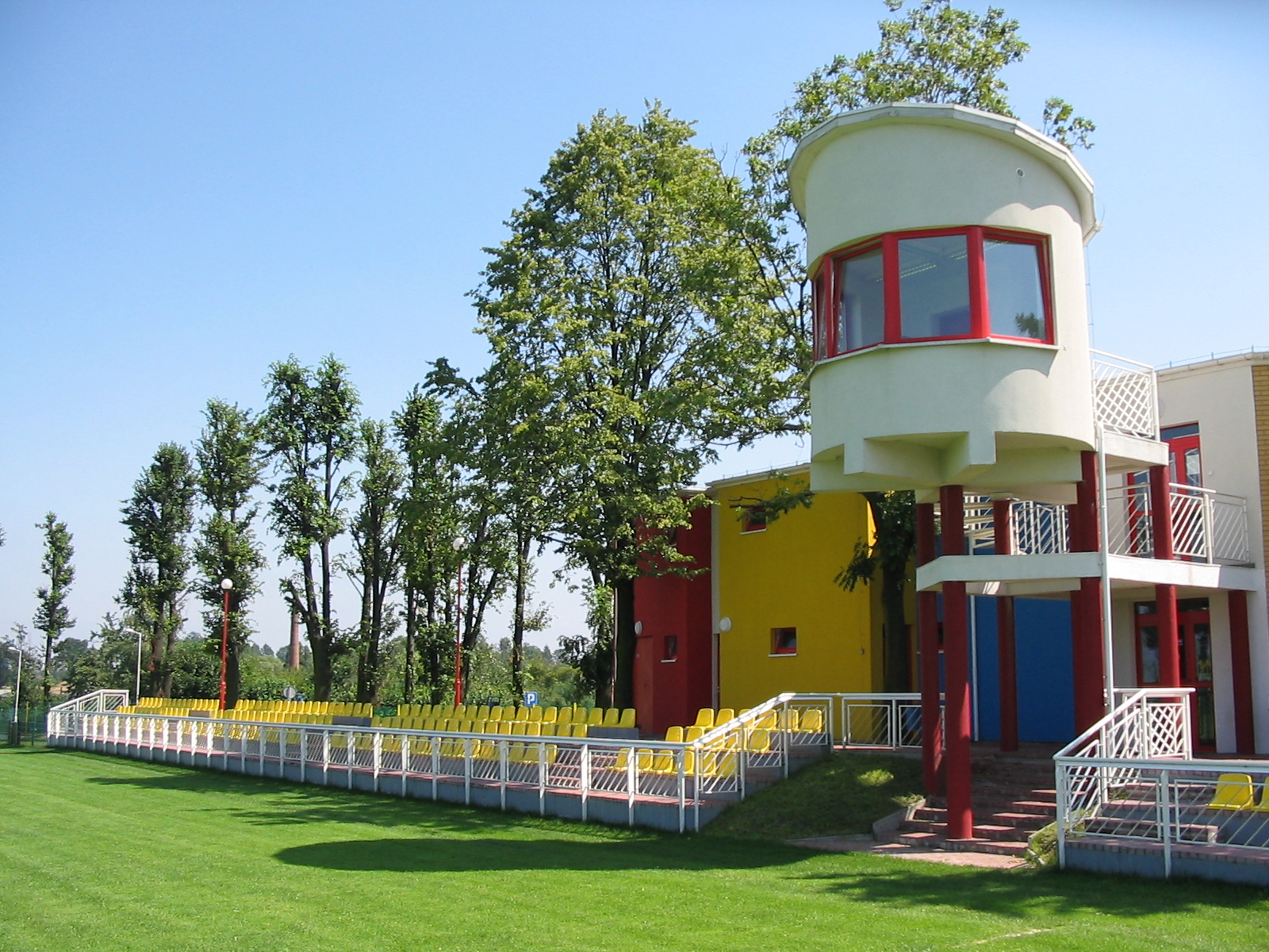 Gminny Ośrodek Sportu w Pawłowicach, powiat pszczyński